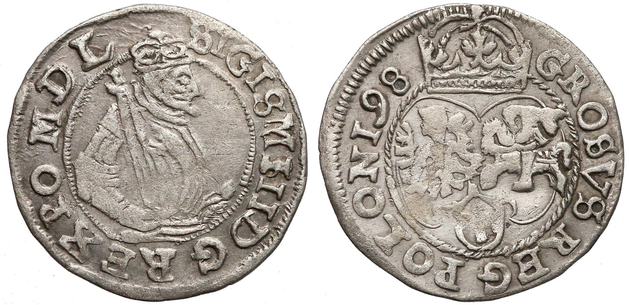 Grosz koronny 1598 Poznań